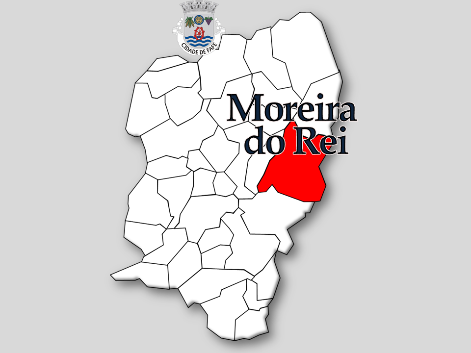 Censos 1864/2011